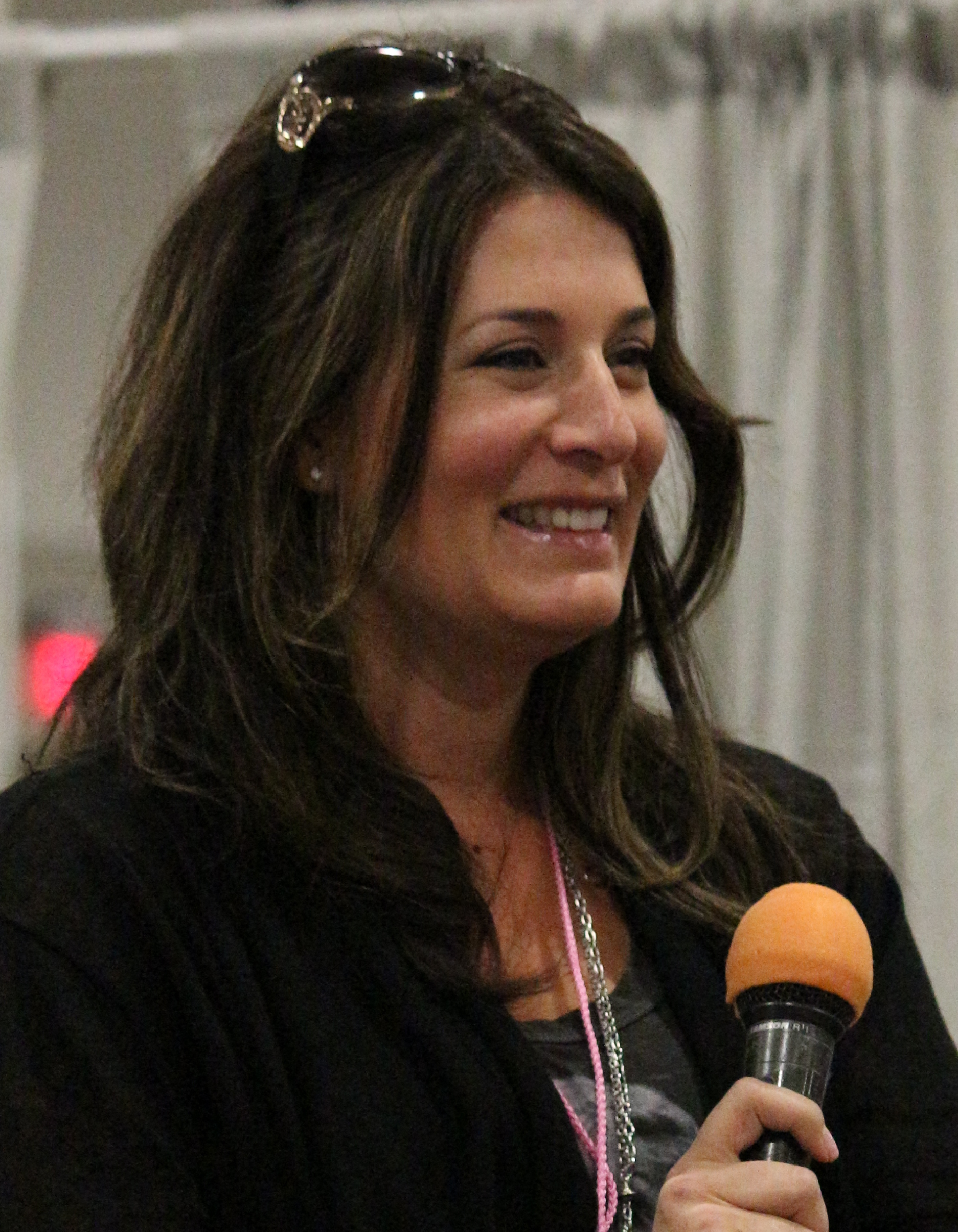 Nicole Oliver at Animate Miami in 2013